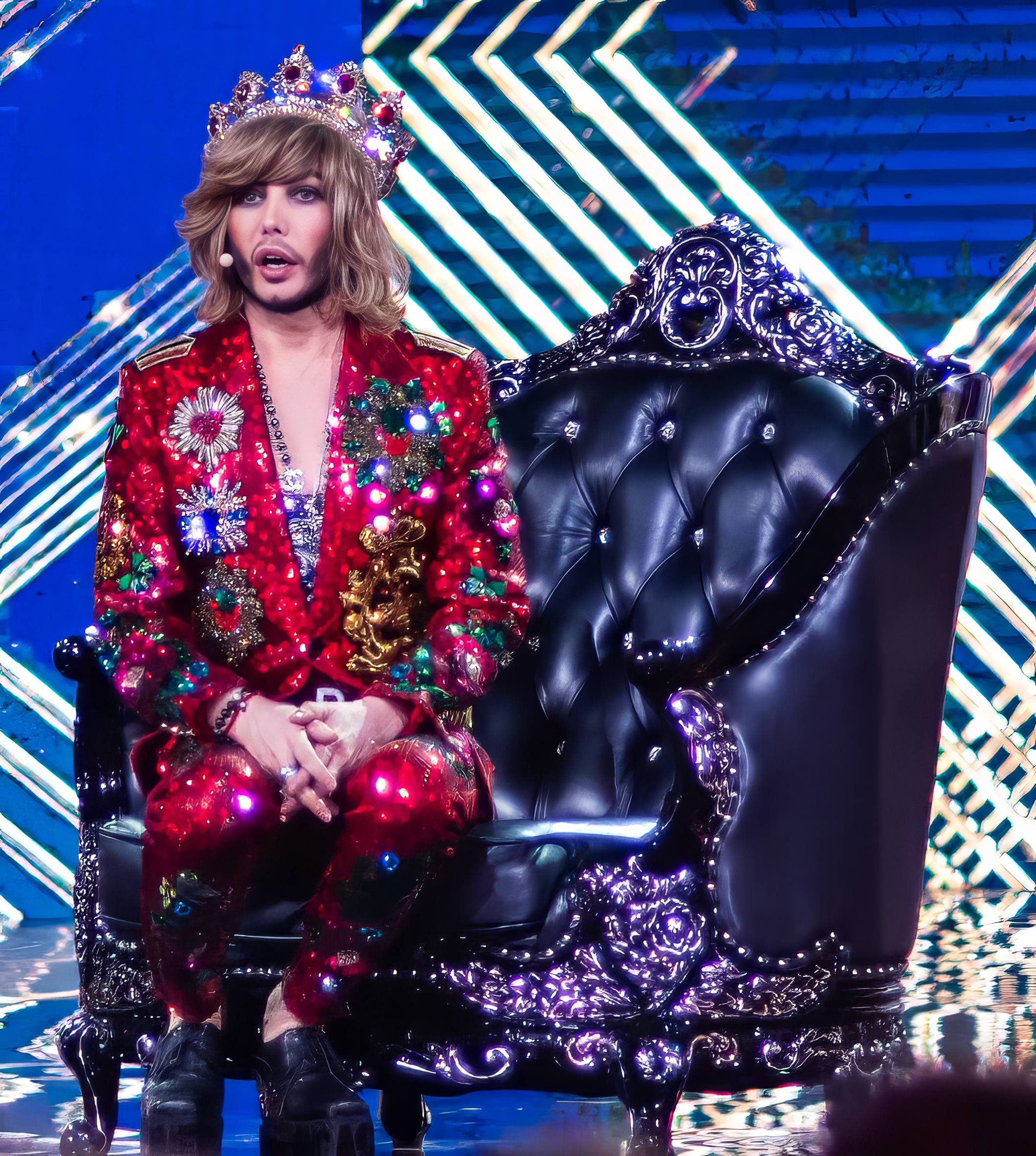 Иван Чуйков и Сергей Зверев на «Шоу выходного дня»